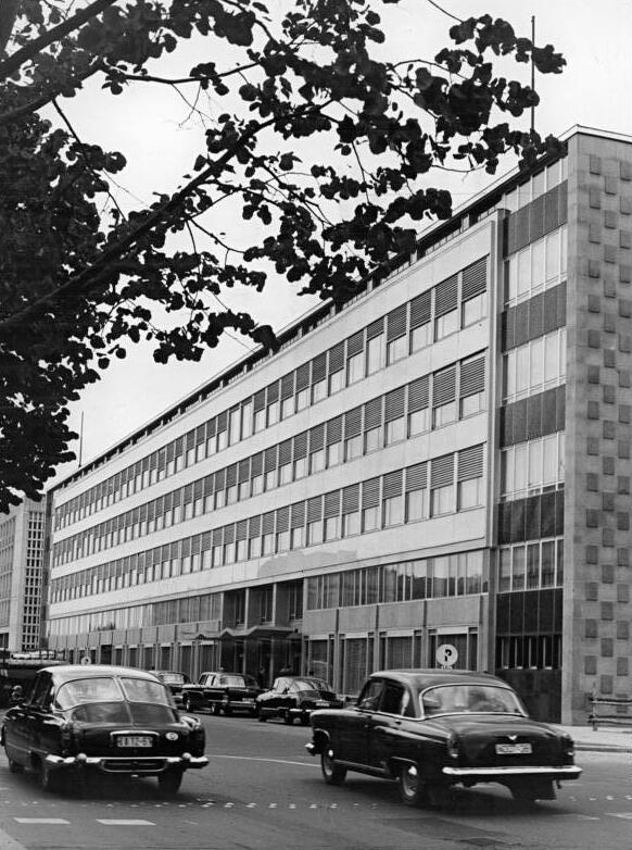 Berlin, Unter den Linden, Aussenhandelsministerium Zentralbild Spremberg 26.7.1965 Außenhandelsministerium Unter den Linden übergeben.Ein ungewöhnlich großer Schlüssel, der dem Minister für Außenhandel und Innerdeutschen Handel,Horst Sölle, am 26.7.1965 überreicht wurde,symbolisierte die feierliche Übergabe des neuen Gebäudes für das Ministerium für Außenhandel und Innerdeutschen Handel der DDR in Berlin Unter den Linden.Das Haus mit seinen acht Gebäudeteilen hat 430 Büroräume,einen großen Saal für 300 Personen,zehn kleinere Sitzungszimmer und verschiedene andere repräsentative Räume.UBz: Das neue Gebäude für das Ministerium für Außenhandel und Innerdeutschen Handel.